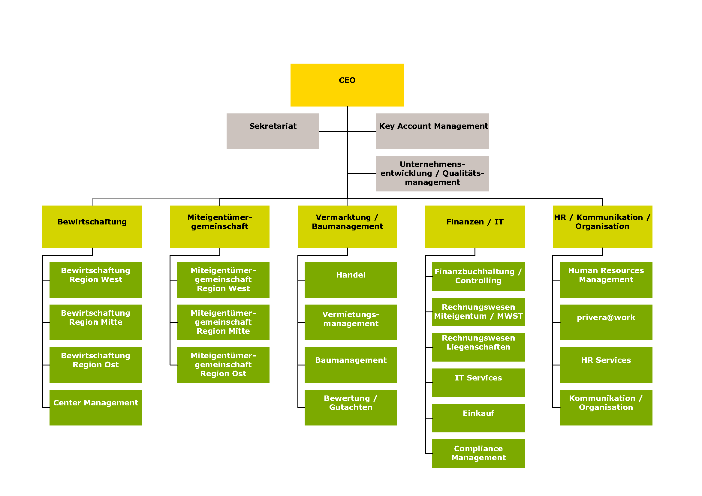 Organigramm PRIVERA